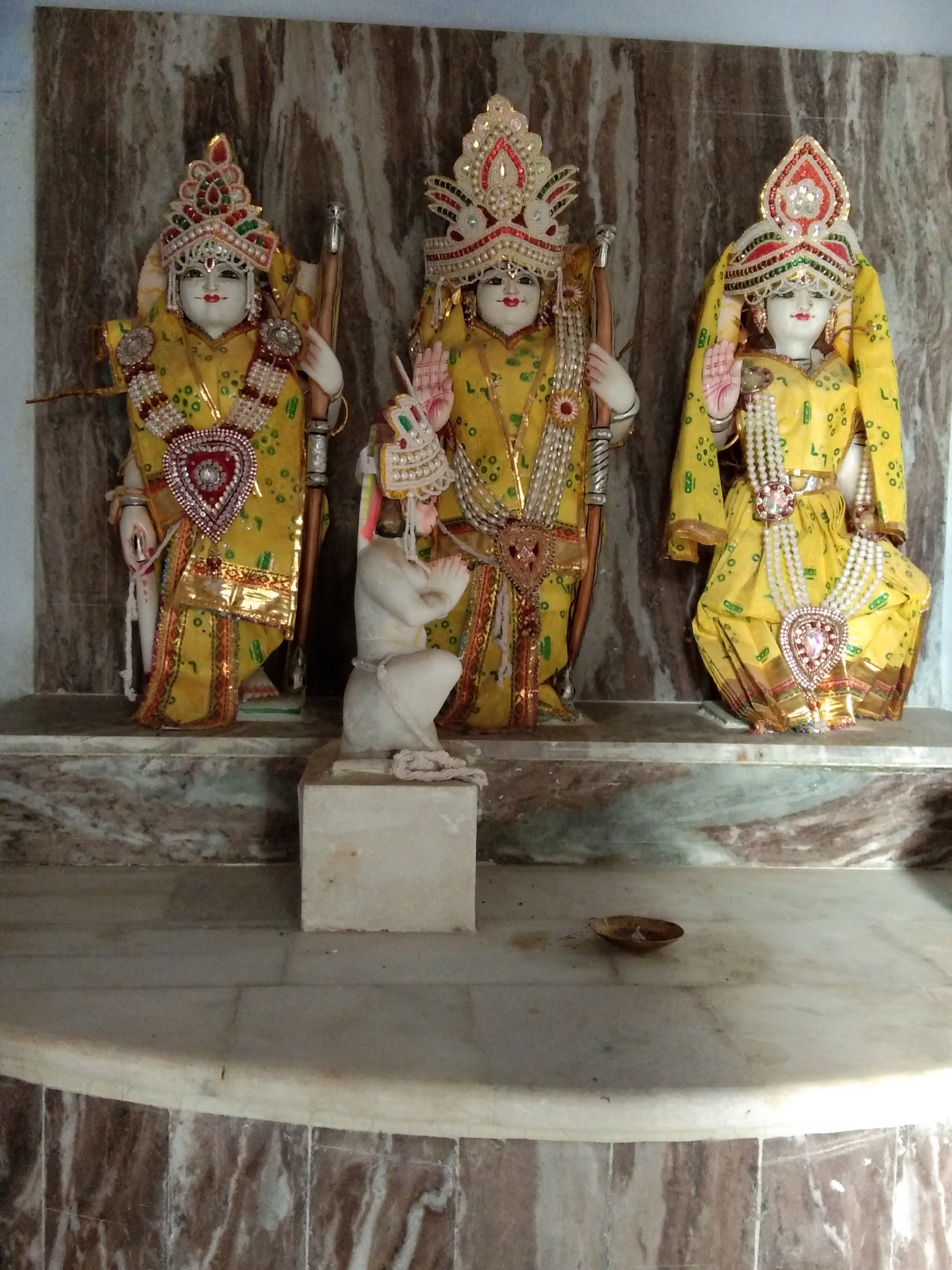 रामदरबार